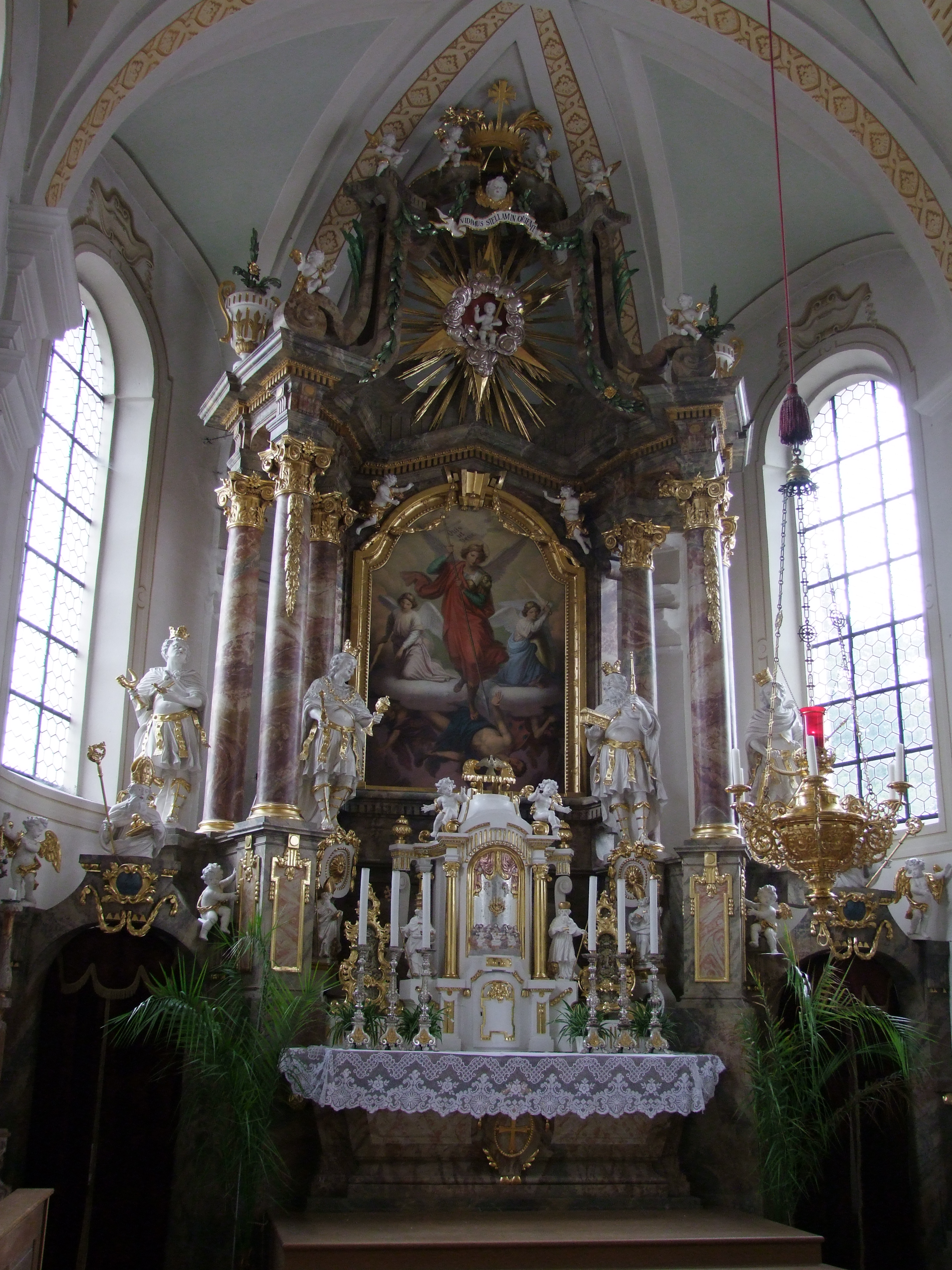 St. Michael in Stockheim bei Bad Wörishofen im schwäbischen Unterallgäu. Das Altarbild zeigt den Engelssturz und wurde 1888 von Max Bentele aus Lindenberg gemalt.